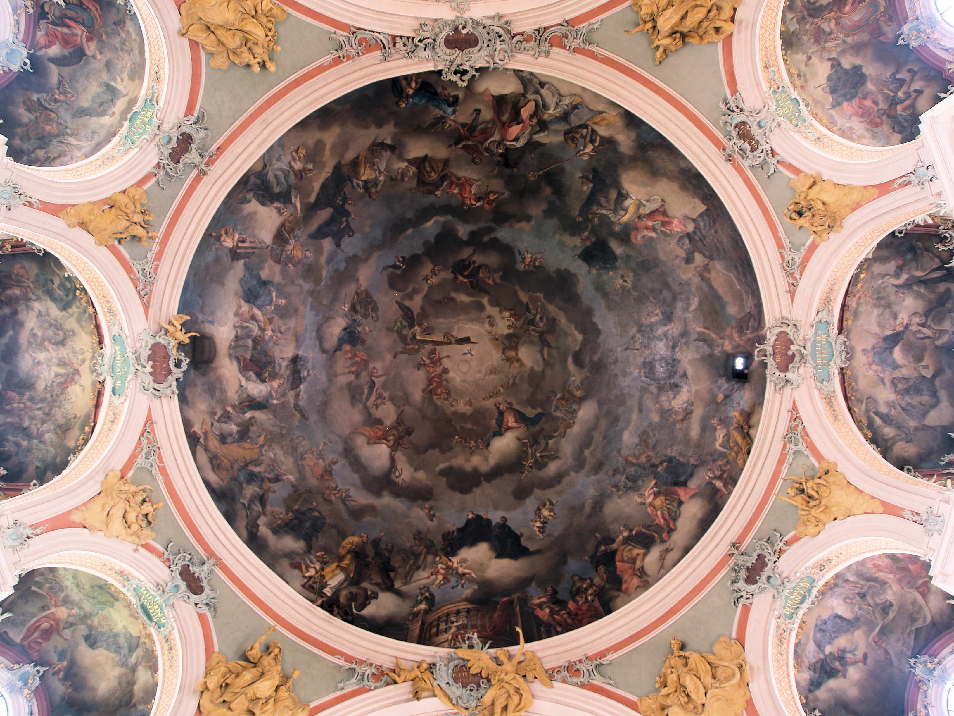 Das Deckengemälde in der Kuppel der Rotunde der Stiftskirche von St. Gallen. Es trägt den Titel, "Paradies". Die Kuppel mit den Strukturen wurde 1760 von Christian Wenziger vollendet, ausführender Maler war Joseph Wannenmacher; das Kuppelgemälde wurde aber 1773 nach den Skizzen von Wenziger von Antoni Dick überarbeitet. Ausrichtung: unten Westen (Schiff), oben Osten (Chor) Johann Christian Wentzinger (1710–1797) Alternative namesWenzinger, ChristianDescriptionGerman architect, sculptor and painterDate of birth/death10 December 17101 July 1797Location of birth/deathEhrenstetten im BreisgauFreiburg im BreisgauAuthority control : Q106952 VIAF: 74648951 ISNI: 0000 0000 8155 3424 ULAN: 500067223 LCCN: n91128577 GND: 118766988 WorldCat Josef Wannenmacher (1722–1780) Alternative namesj. wannenmacher; Joh. Georg Wannenmacher; josef wannenmacher; I. wannenmacher; Joseph Wannenmacher; Joseph WannerDescriptionGerman painterDate of birth/death18 September 17226 December 1780Location of birth/deathTomerdingenTomerdingenWork locationUpper Swabia; SwitzerlandAuthority control : Q1708192 VIAF: 3266547 ISNI: 0000 0000 6674 5823 ULAN: 500056354 LCCN: nr88003805 GND: 118764330 WorldCat